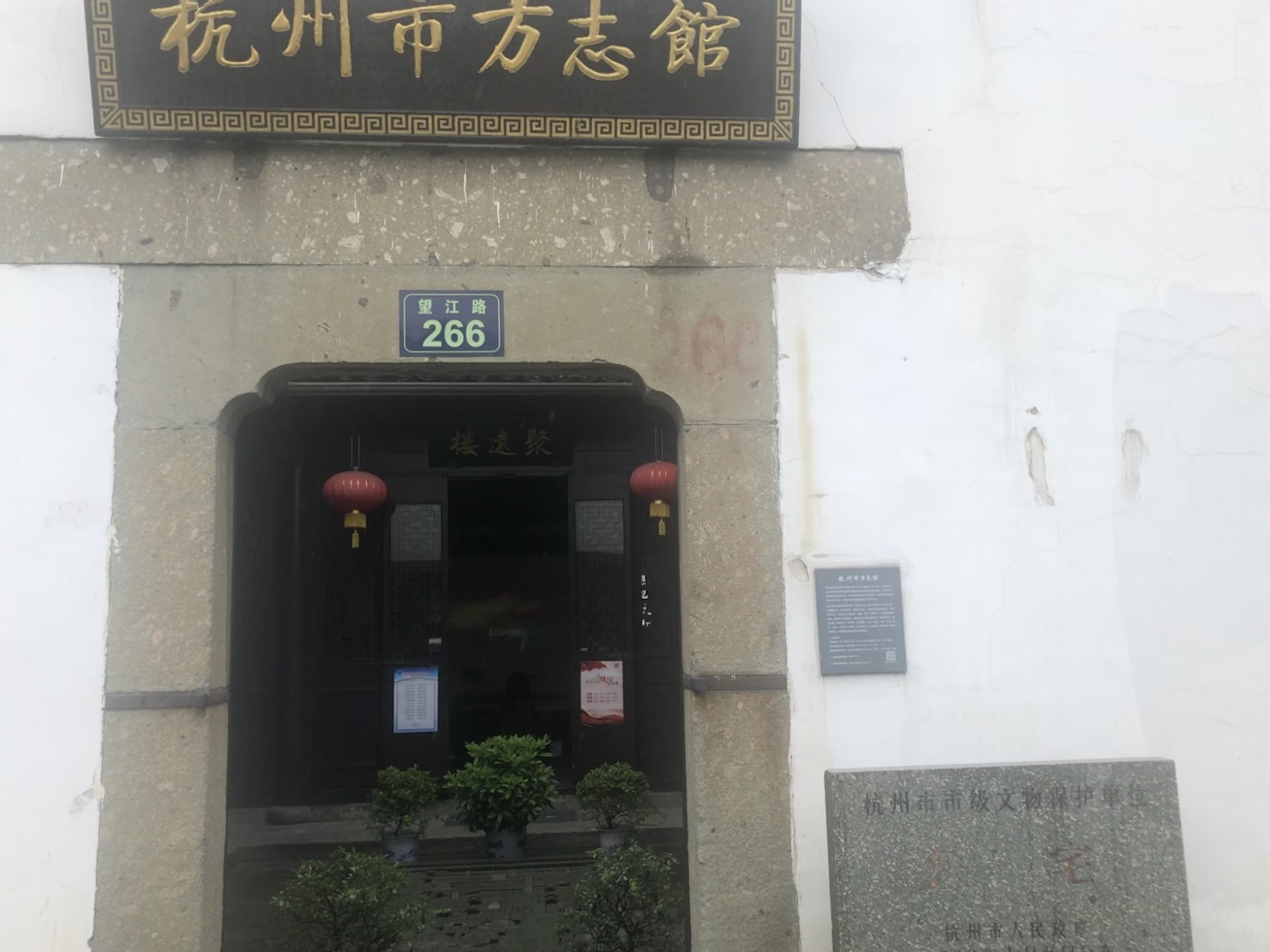 杭州方志馆正门